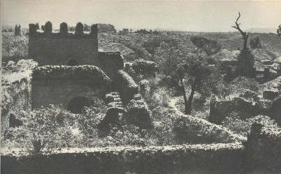 בית מפקד חיל הפרשים